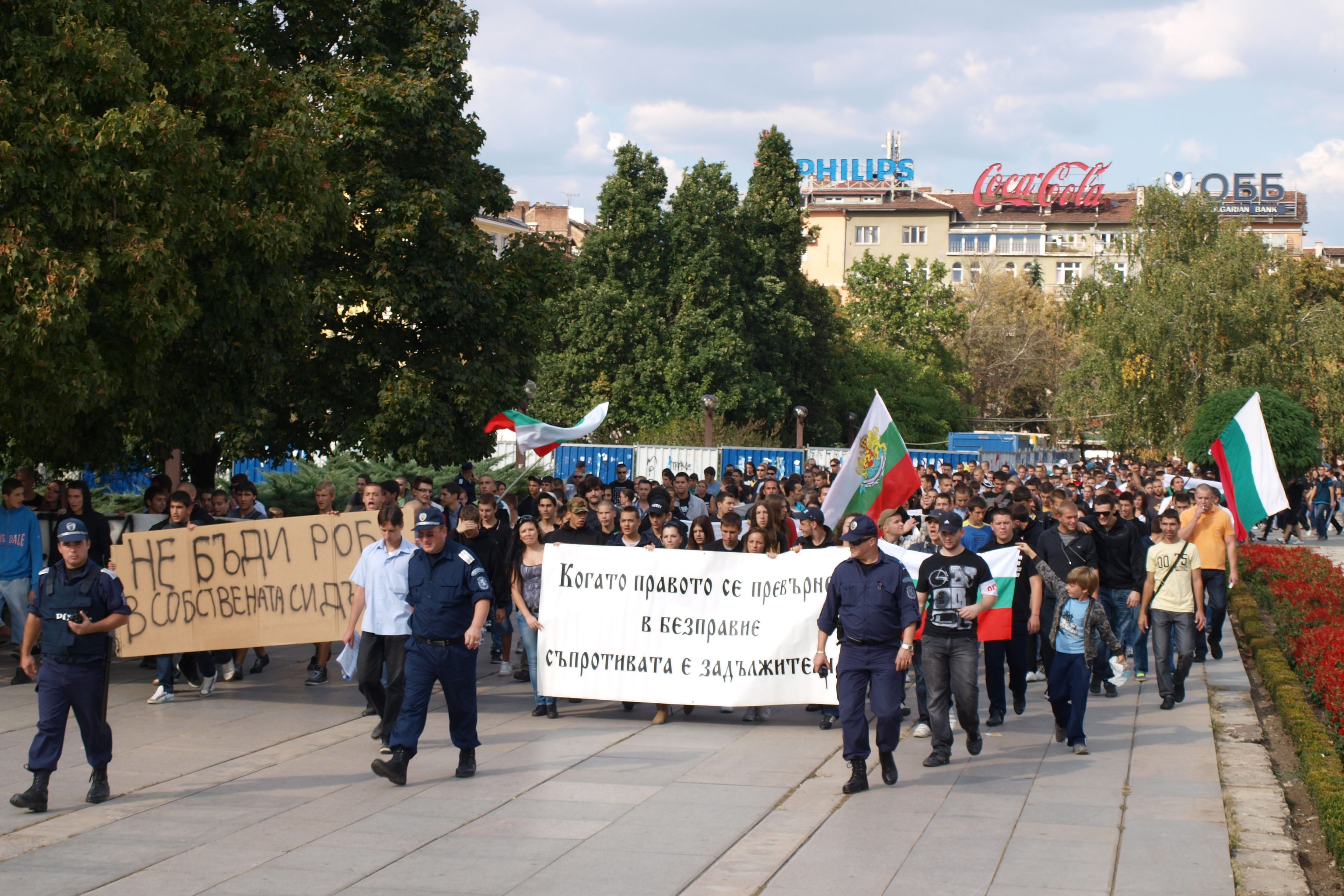 Протест срещу циганската престъпност в София.